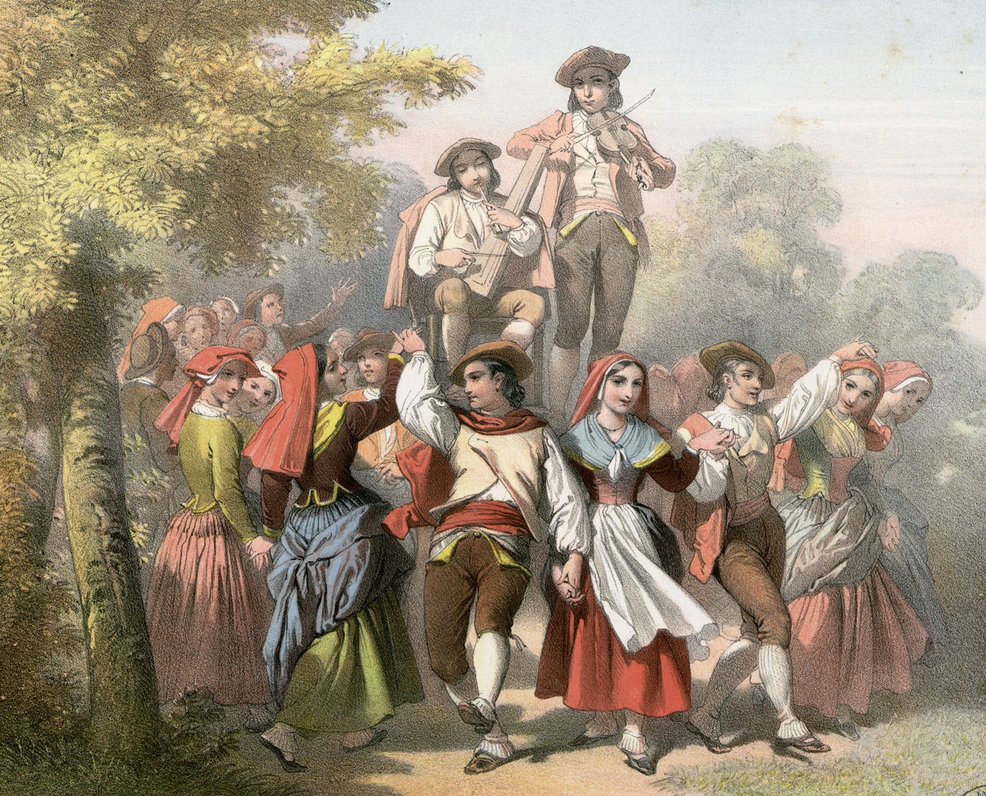 Branle d'Ossau (notice complète sur le site de la bibliothèque de Toulouse)